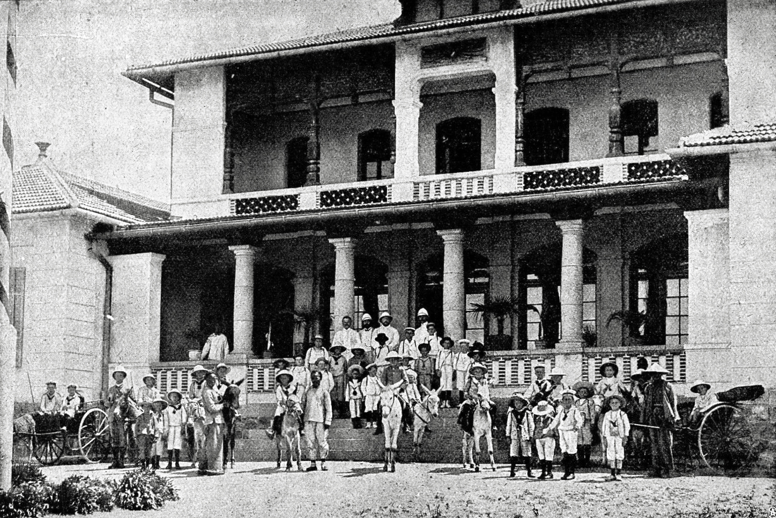 青岛督署学校德籍学生